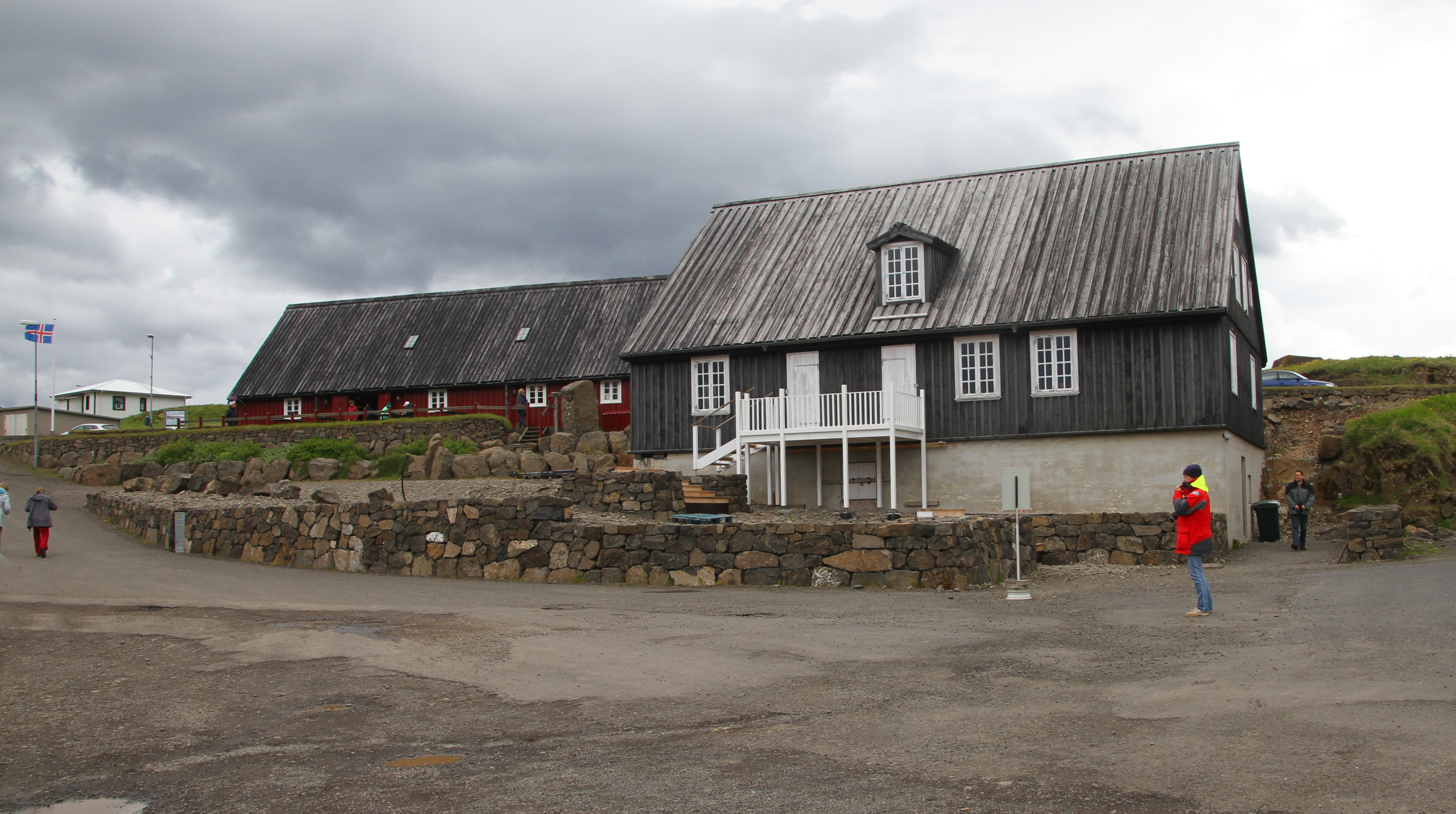 Djúpivogur in Island